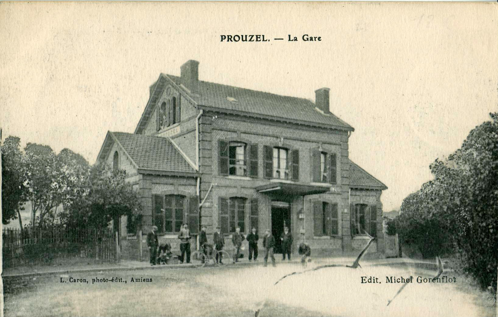 Carte postale ancienne éditée par Michel Gorenflot, cliché L. Caron : PROUZEL - La Gare